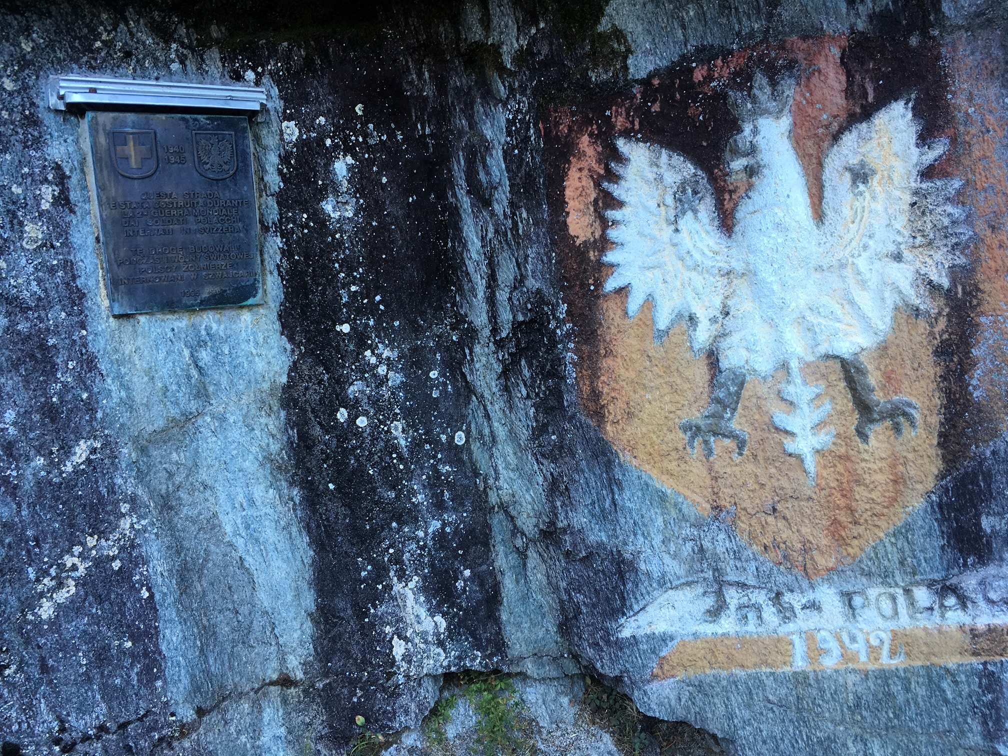 Tafel und Wappen am Polenweg